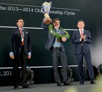 Magnus Carlsen, WM 2014. Чемпионат мира по шахматам. Сочи.